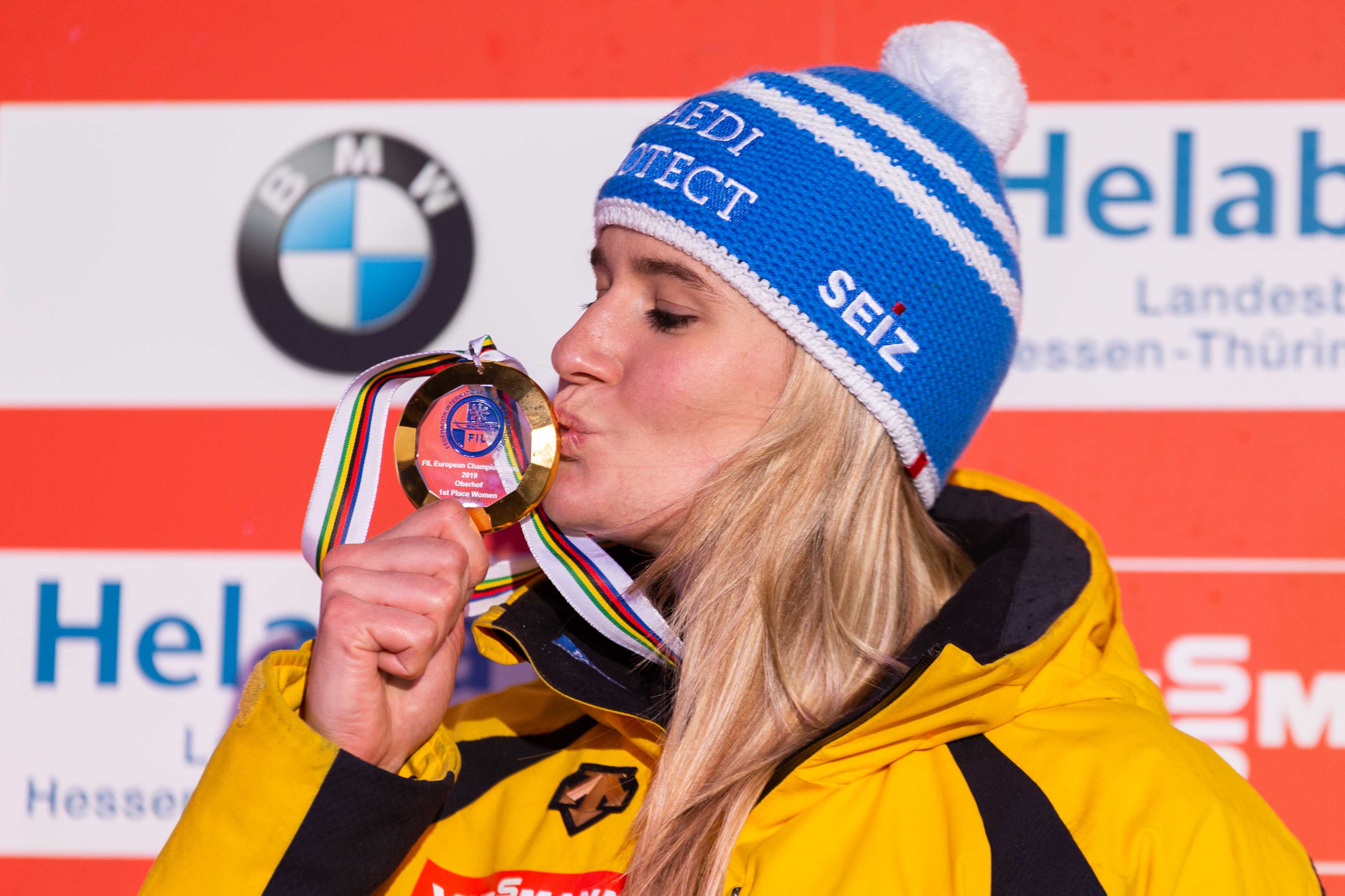 Viessmann Luge World Cup Oberhof; Natalie Geisenberger (GER, Deutschland) küsst die EM-Goldmedaille; Sieger, Erstplatzierter, Goldmedaille, gold medal; Flower Ceremony, Blumenzeremonie, Siegerehrung; Jubel, celebration